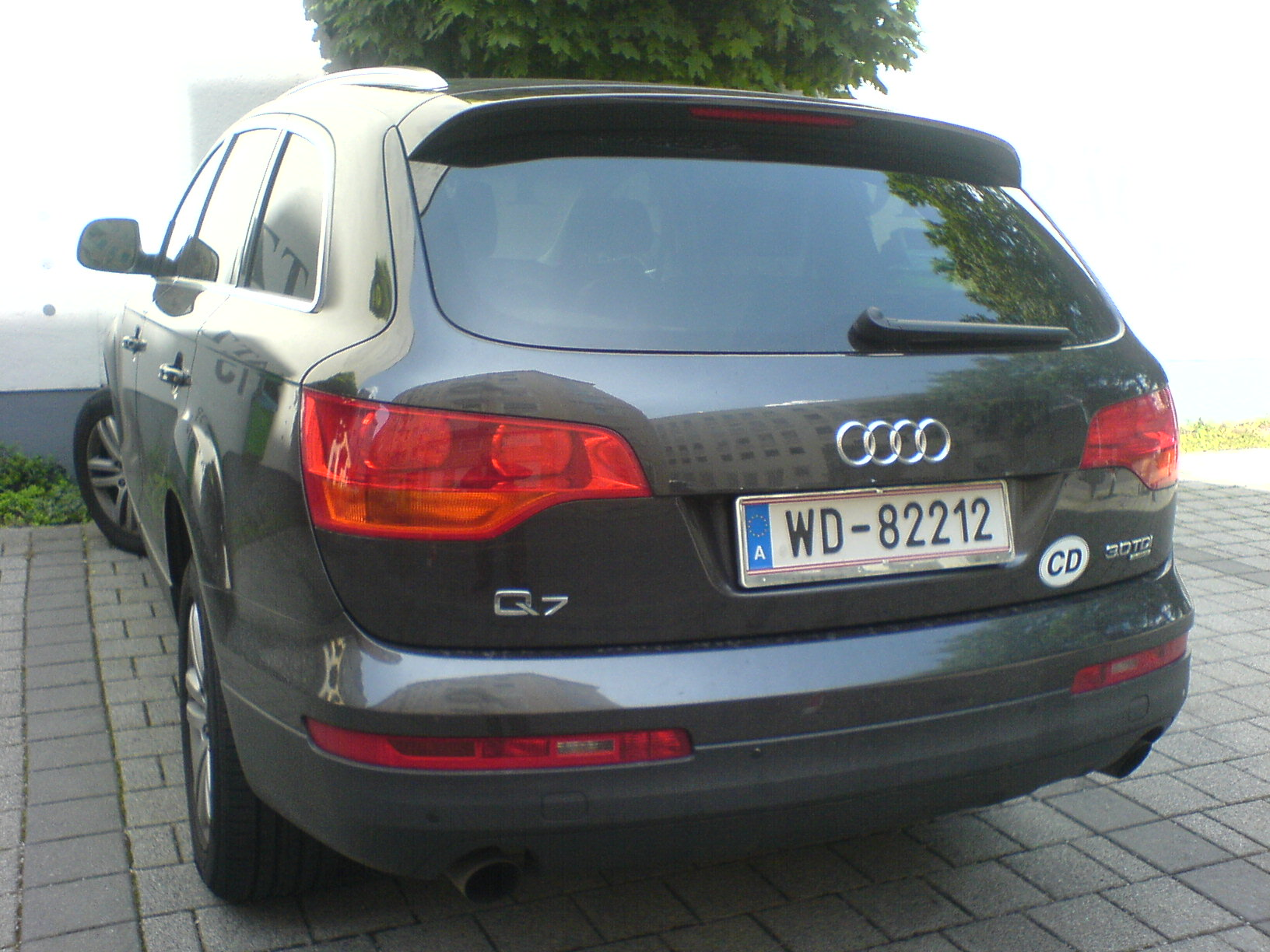 Österreichisches Diplomatenkennzeichen WD - 82212 (Audi Q7)